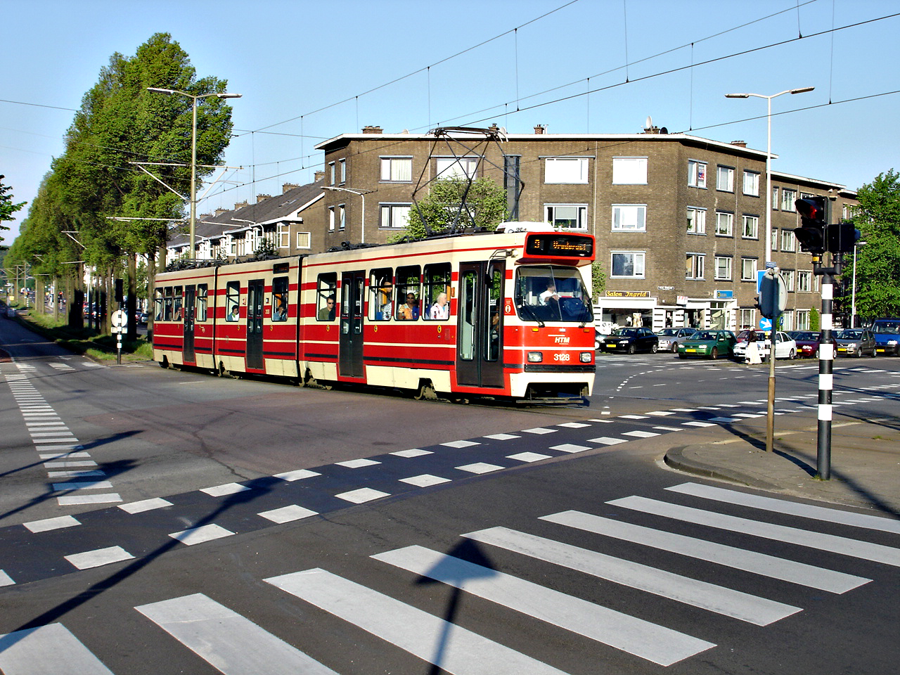 Lijn 9 GTL 3128 te Den Haag